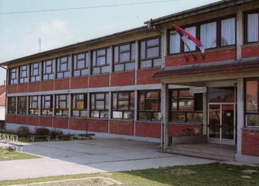 ОШ Бранко Радичевић у Вранешима